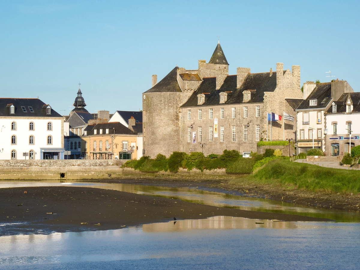 Château et étang de la ville de Pont-l'abbé, en Bretagne.